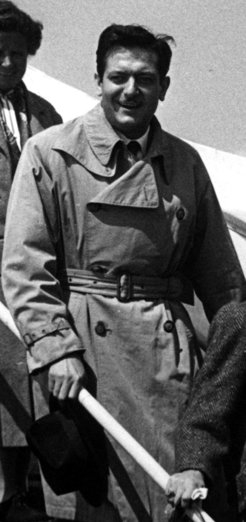 Detalle de una fotografía tomada en 1948 en el que aparece el actor español Alberto Closas desembarcando de un avión